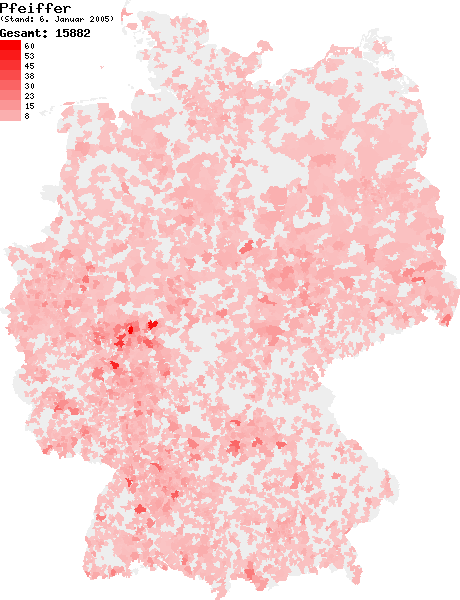 Verteilung des Nachnamens Pfeiffer in Deutschland nach dem Telefonbuch mit Stand vom 6. Januar 2005